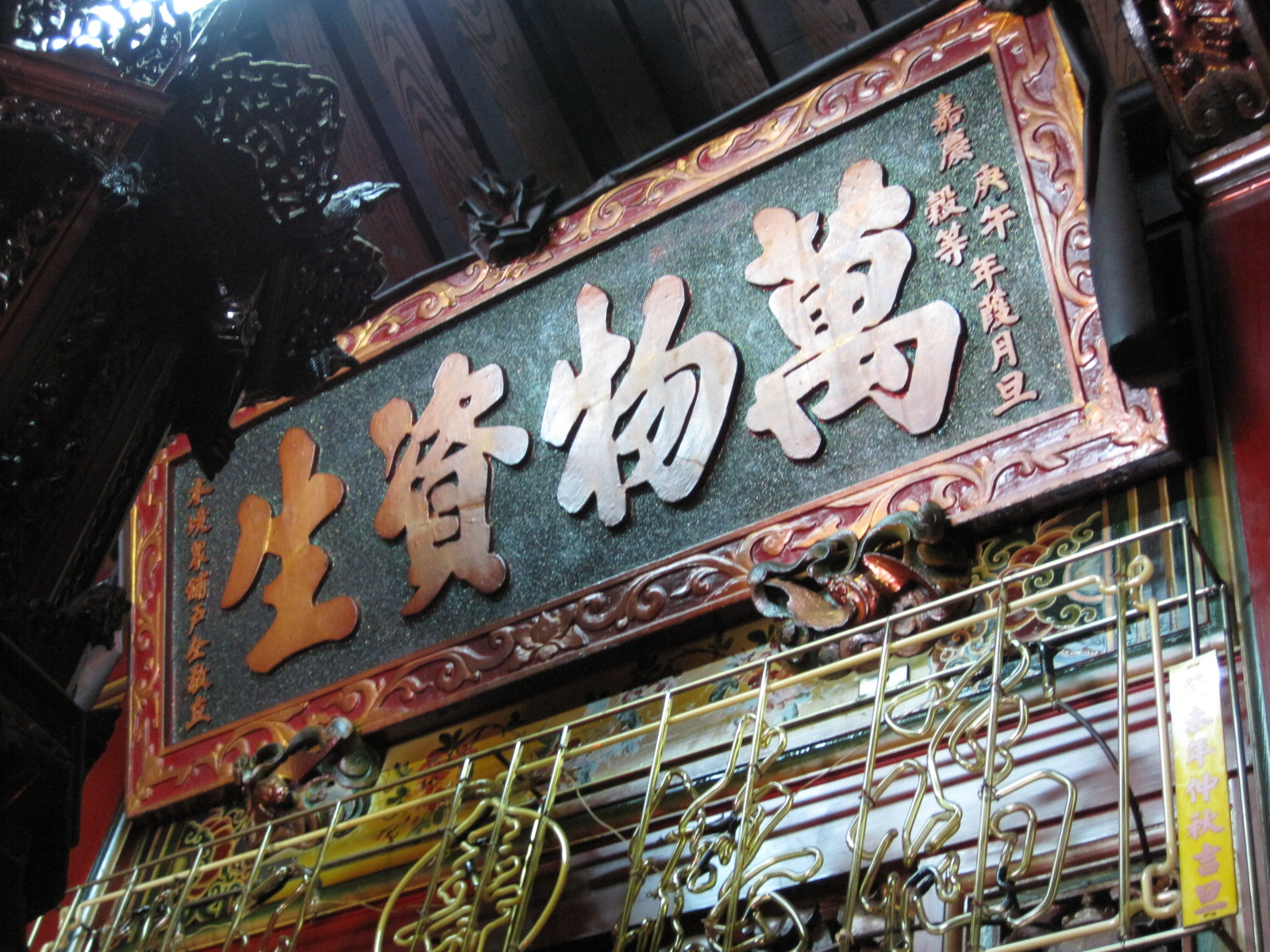 臺南景福祠萬物資生匾